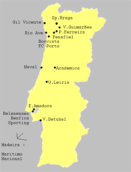 carte des clubs du championnat du portugal de football 2005-06